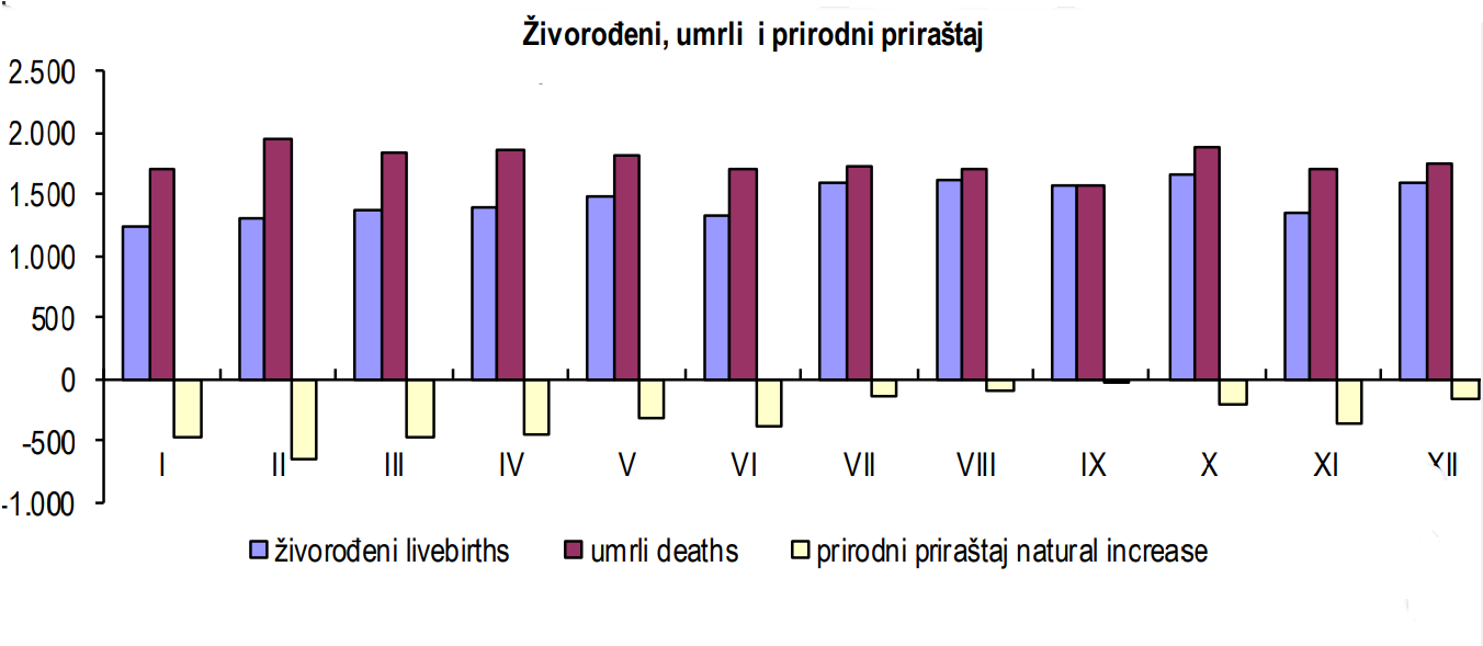 p